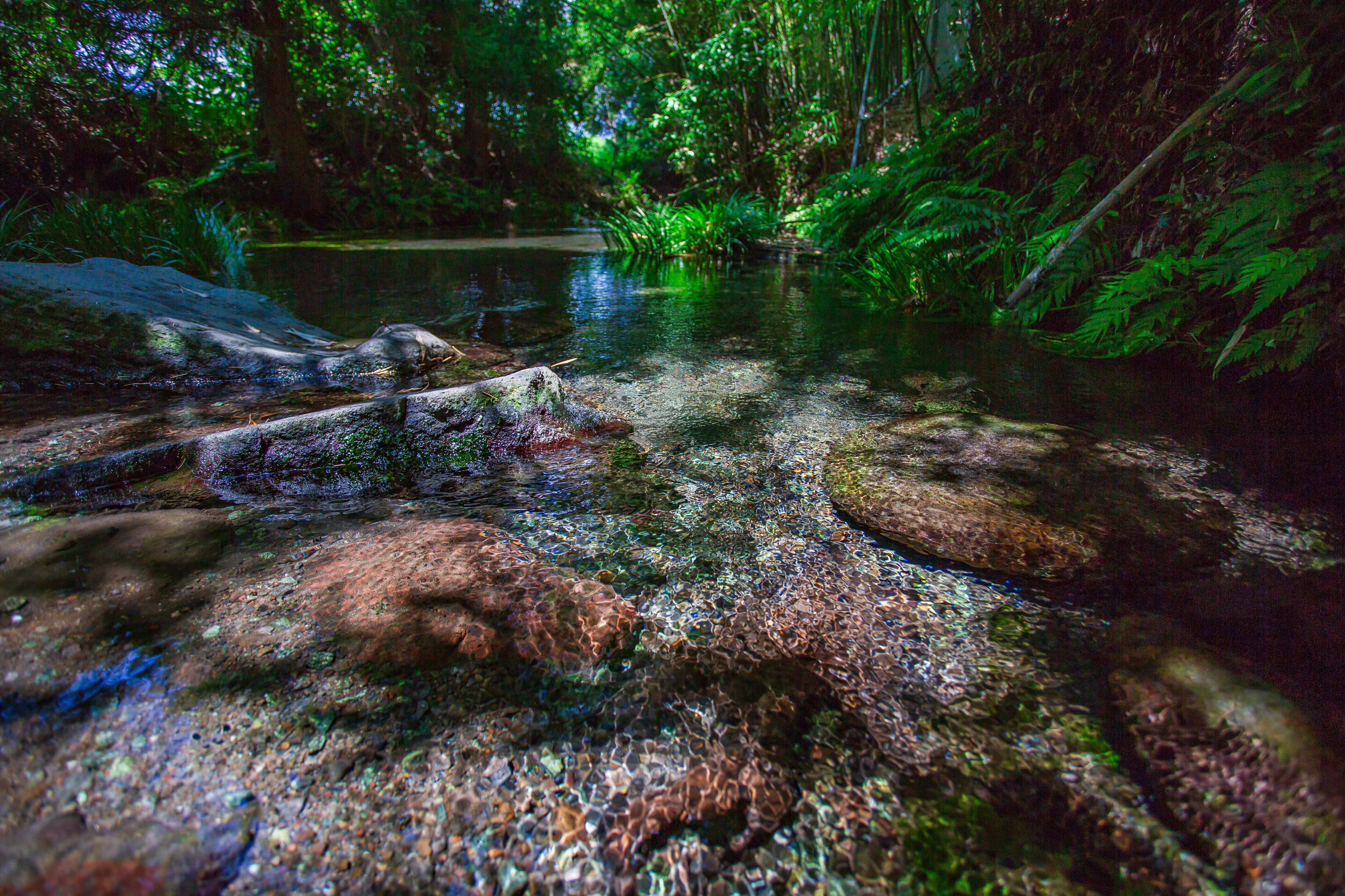 くまもと名水１００選 竹崎水源 2019/9/7撮影